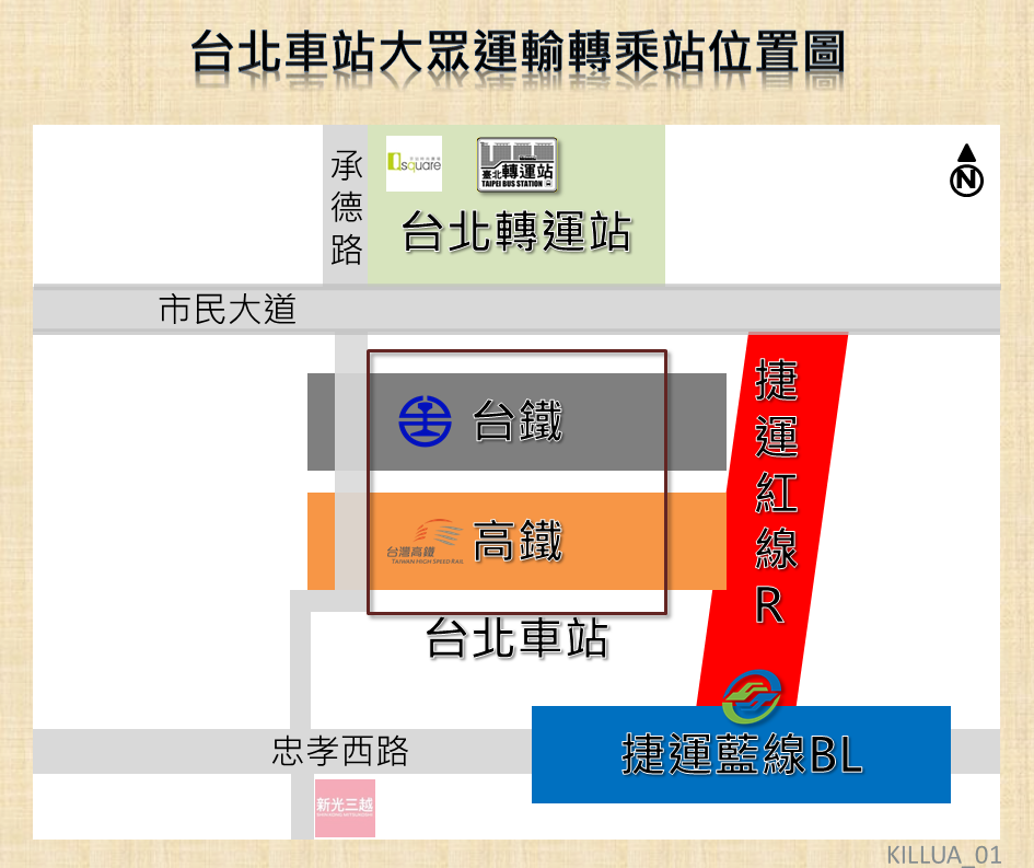 台北車站大眾運輸轉乘站位置圖